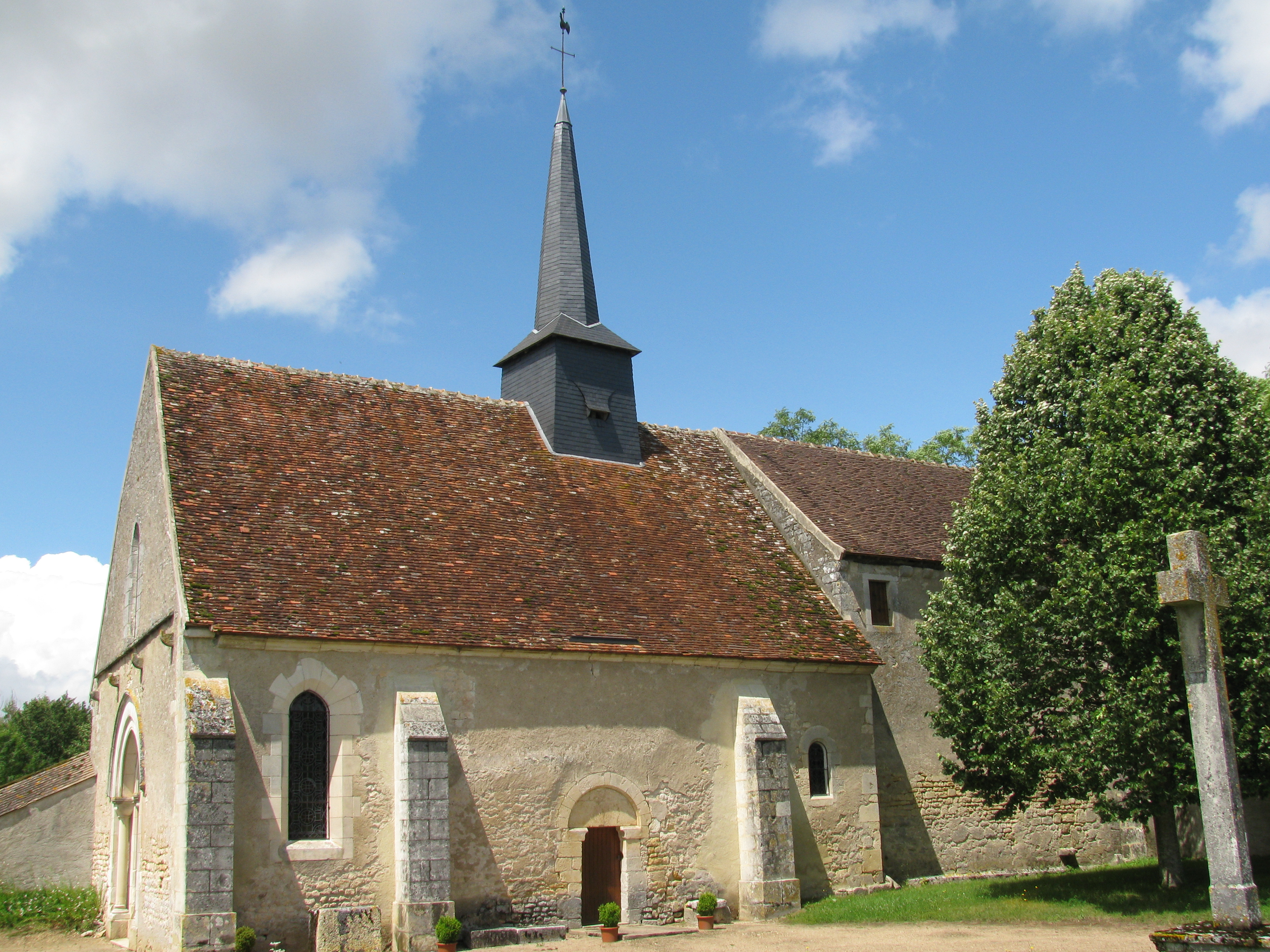 Église saint-Martin de Bulcy, Nièvre, France.